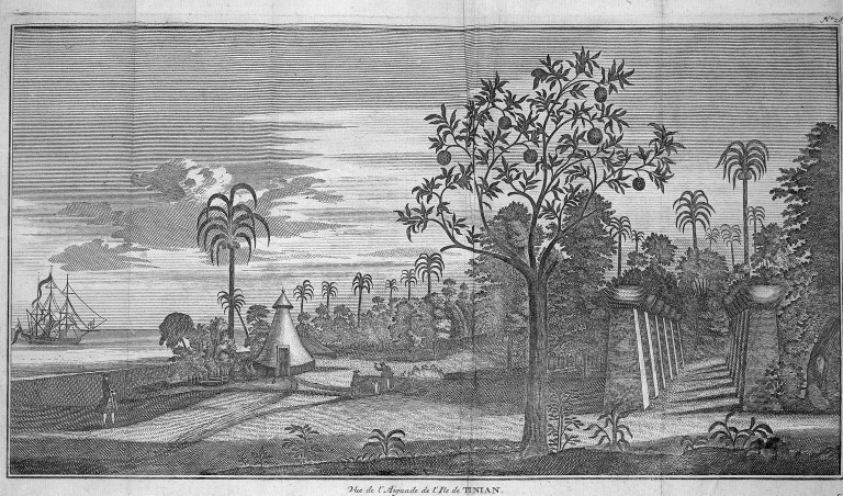 [Illustrations de Voyage autour du monde] Auteur : George Anson Éditeur : Henri-Albert Gosse et Compagnie (Genève) 1750